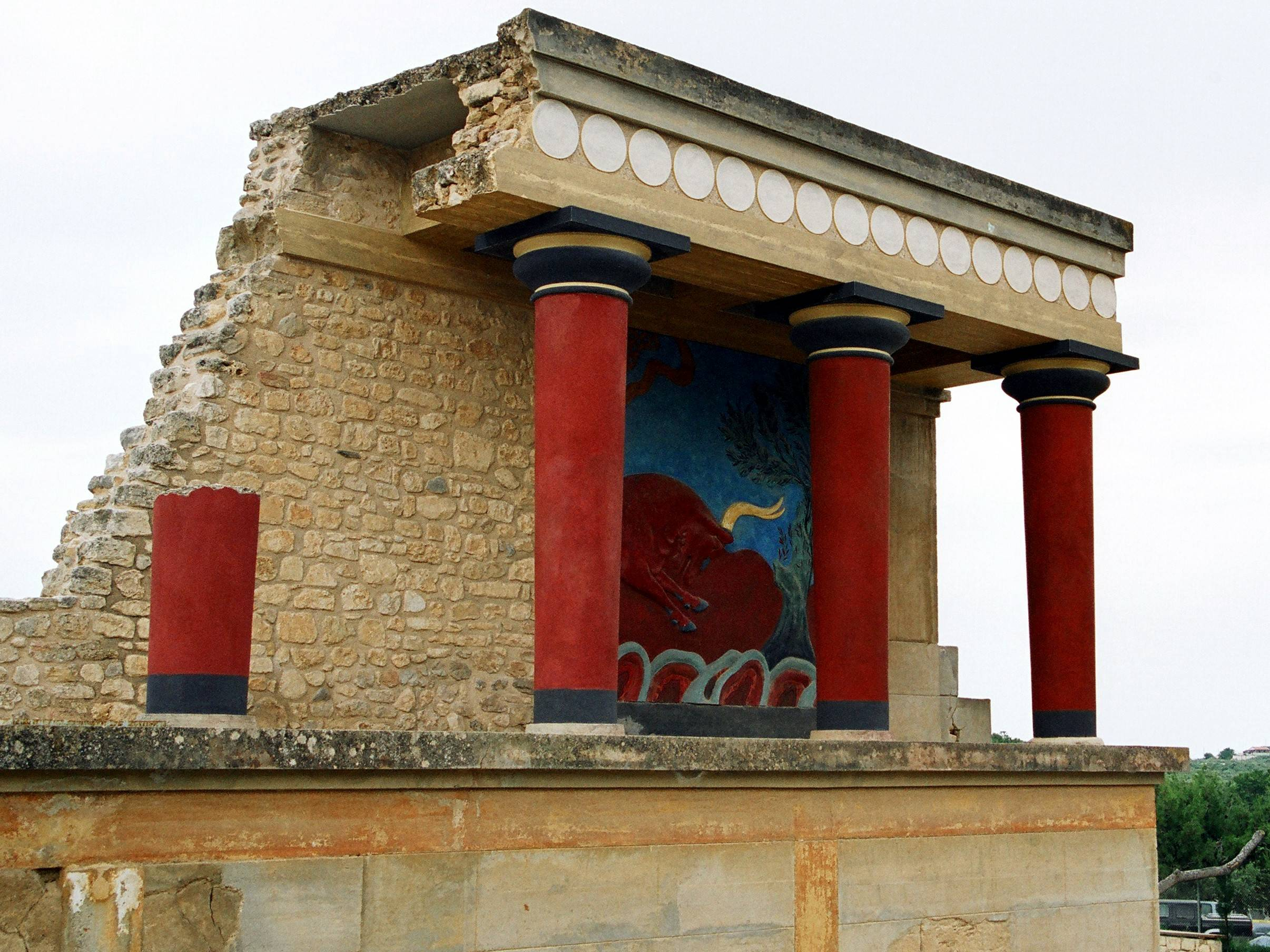 Knossos südlich von Iraklio, Kreta, Griechenland